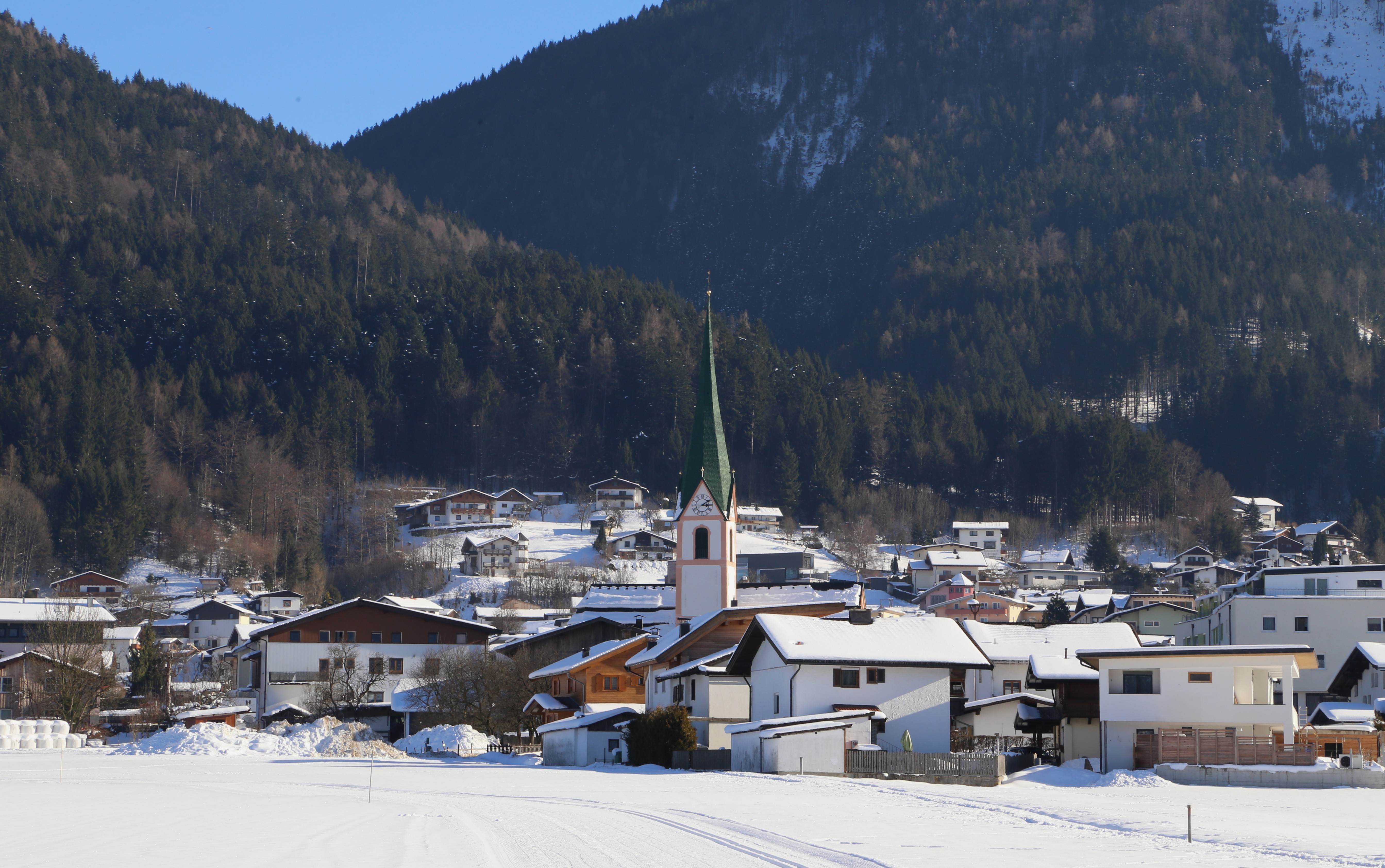 Kath. Pfarrkirche hl. Johannes der Täufer, Bad Häring, Tirol